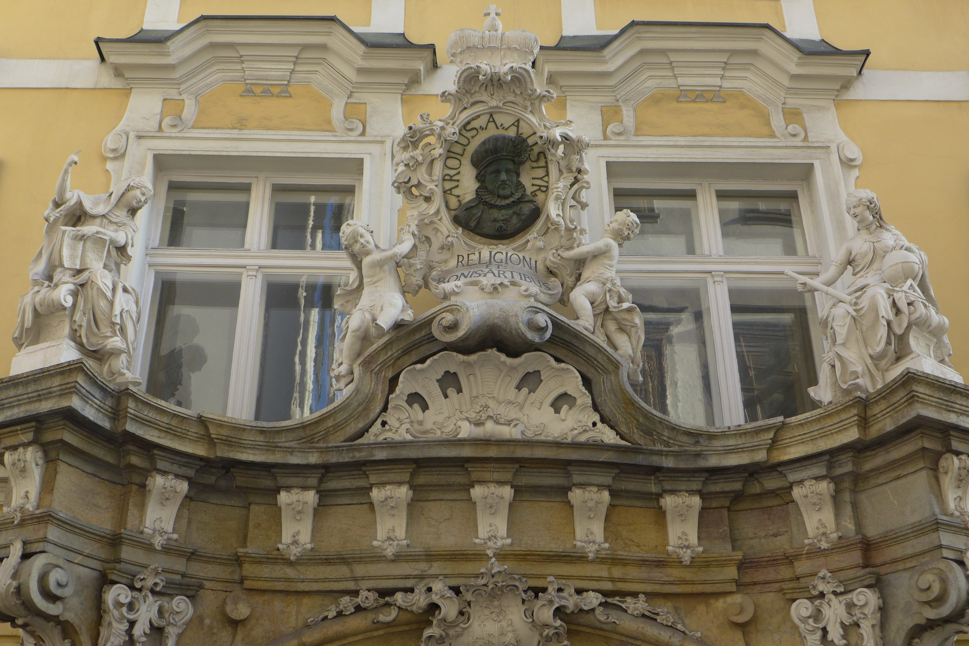 Portrait-Relief Erzherzog Karl II. (Domherrenhof Graz/Adeliges Jesuitenkonvikt 1597-1775: Portal mit Skulpturen-Schmuck von Veit Königer)